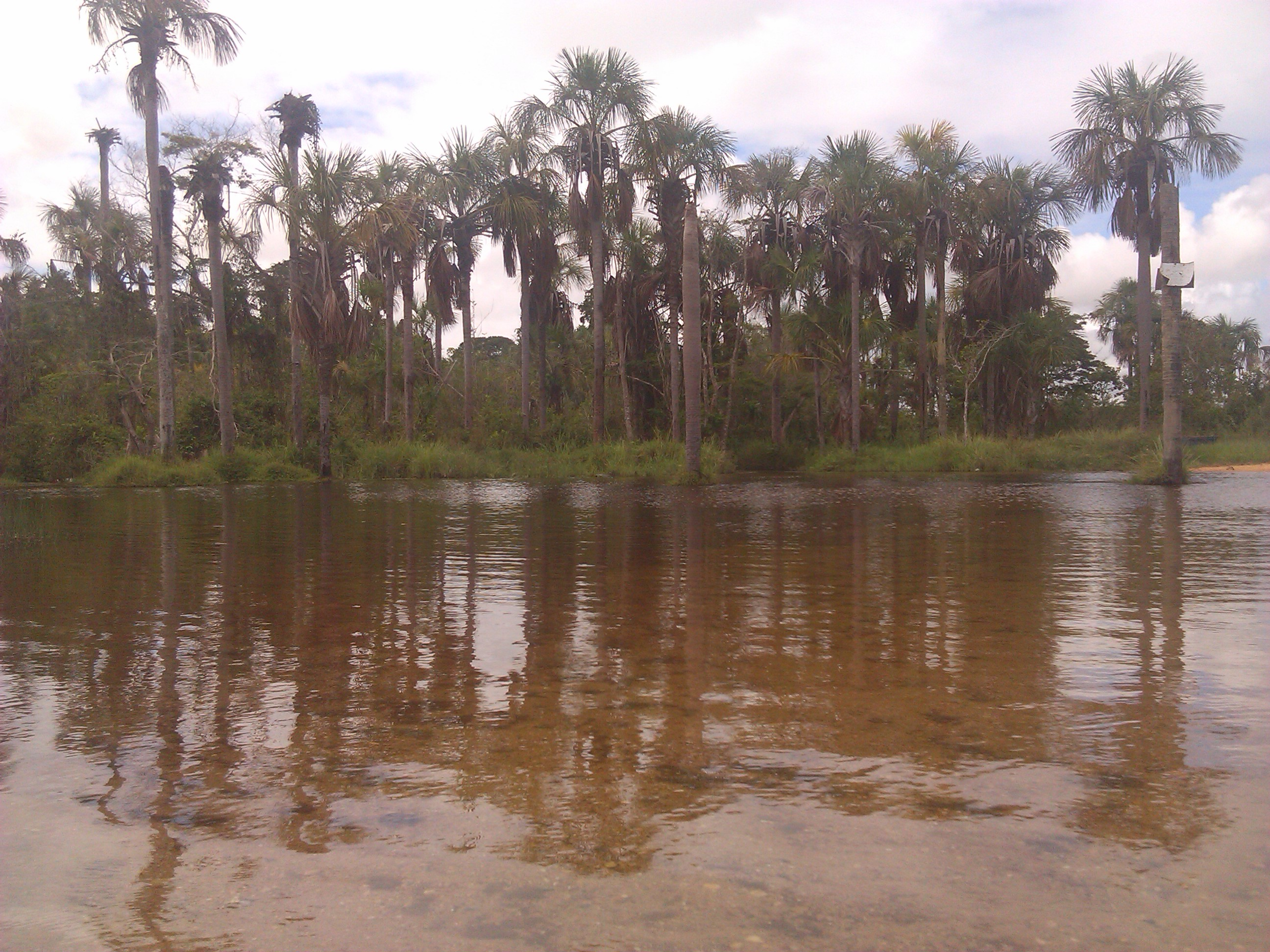 Río Amana cerca de Puente Hierro, Estado Monagas.